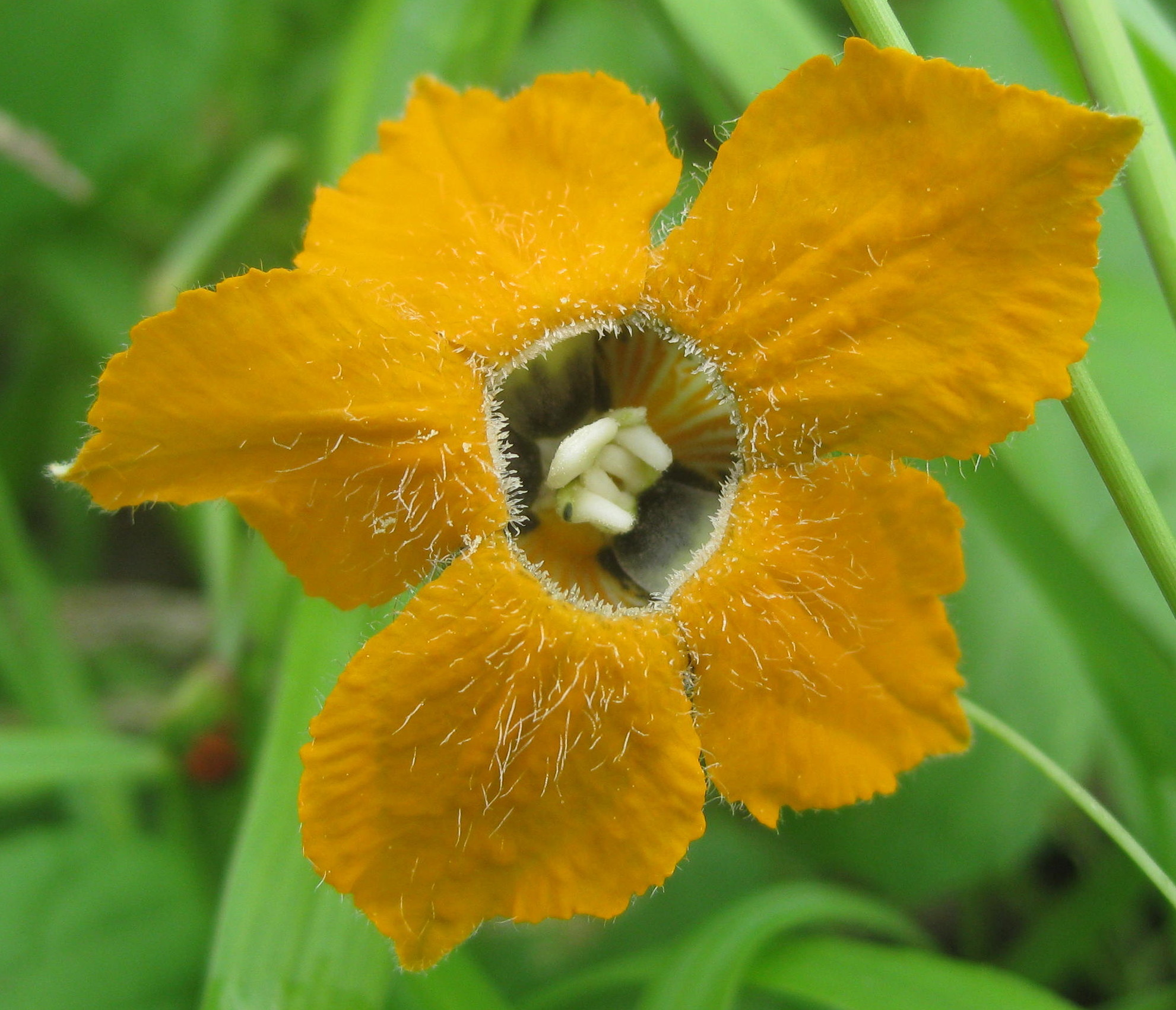 Momordica boivinii